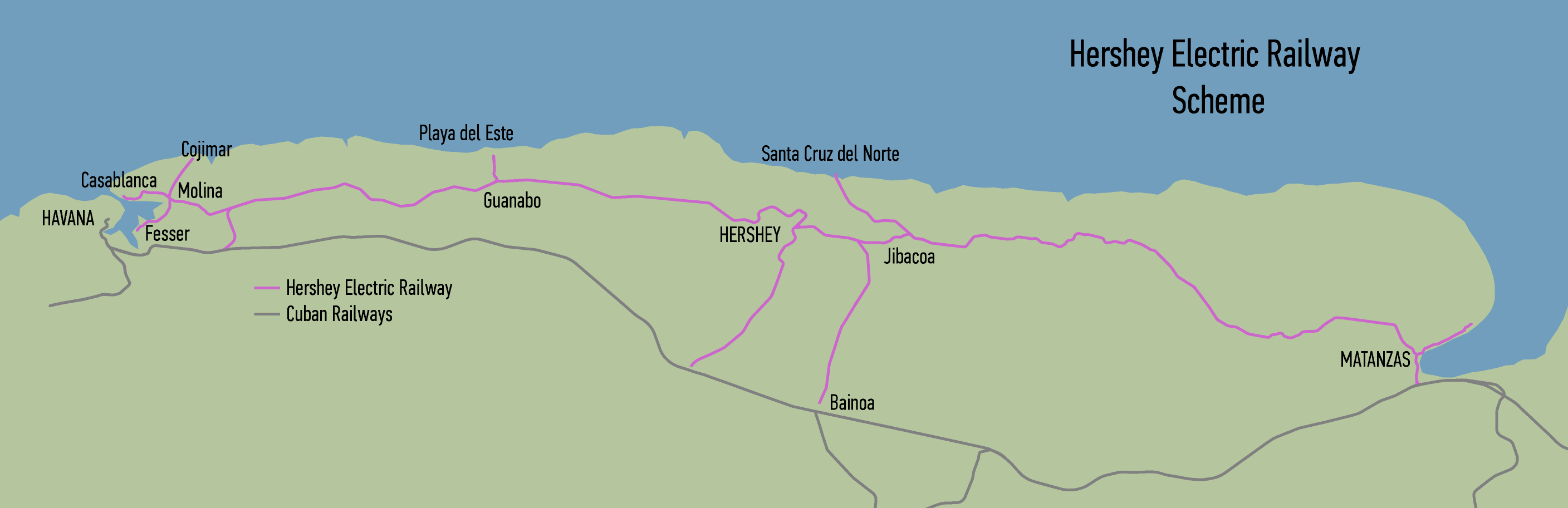 Cuban Hershey Railway Scheme